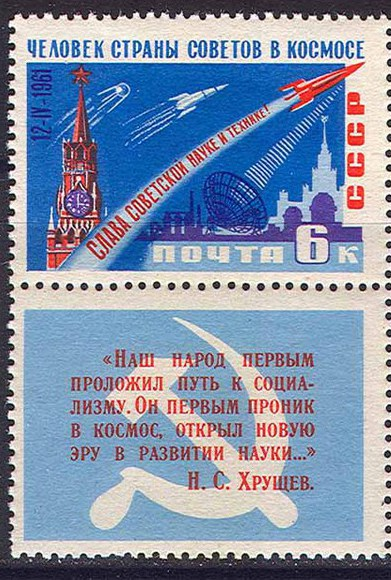 Почтовая марка, посвящённая полёту Ю.А.Гагарина 12 апреля 1961 года с цитатой Н.С. Хрущёва